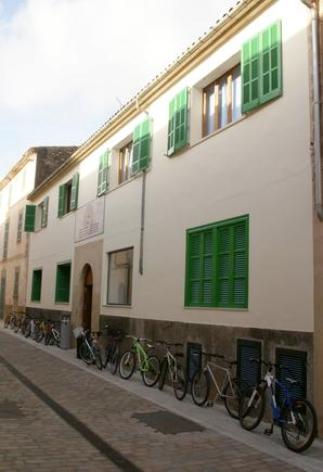 Façana del col·legi Fra Joan Ballester